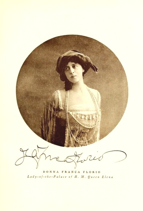 Illustration aus " Italian castles and coutry seats "